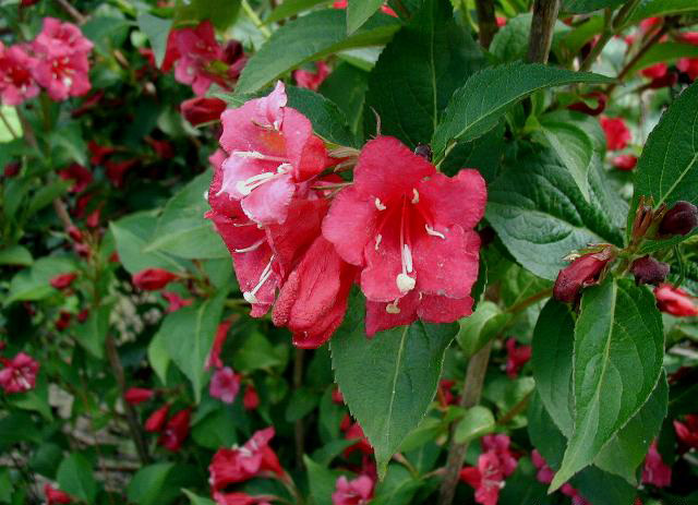 Weigela hybrida